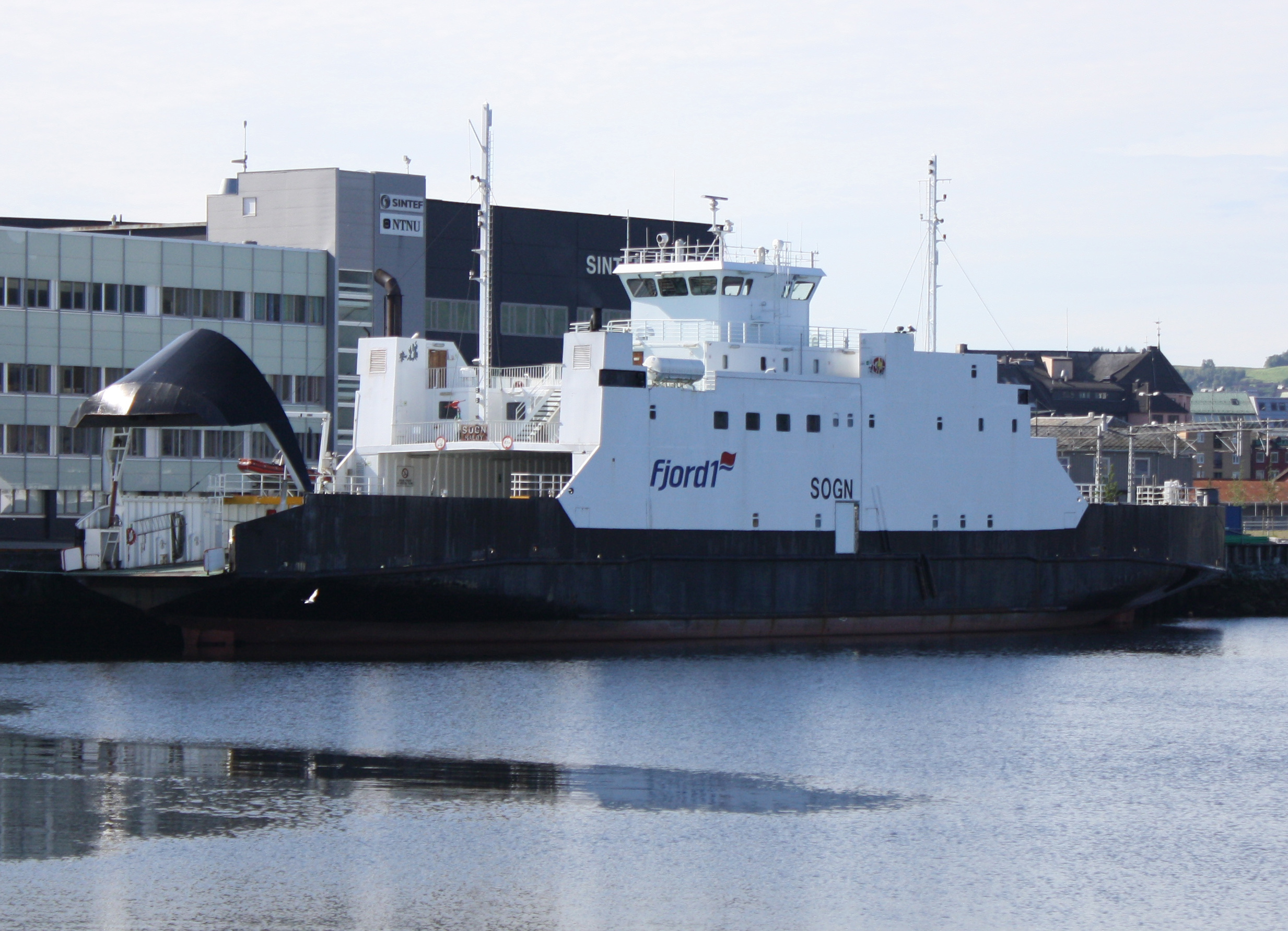 Bilferja Sogn, som settes inn som ekstraferje på strekningen Flakk–Rørvik, ligger mellom slagene fortøyd i Brattørbassenget i Trondheim havn.